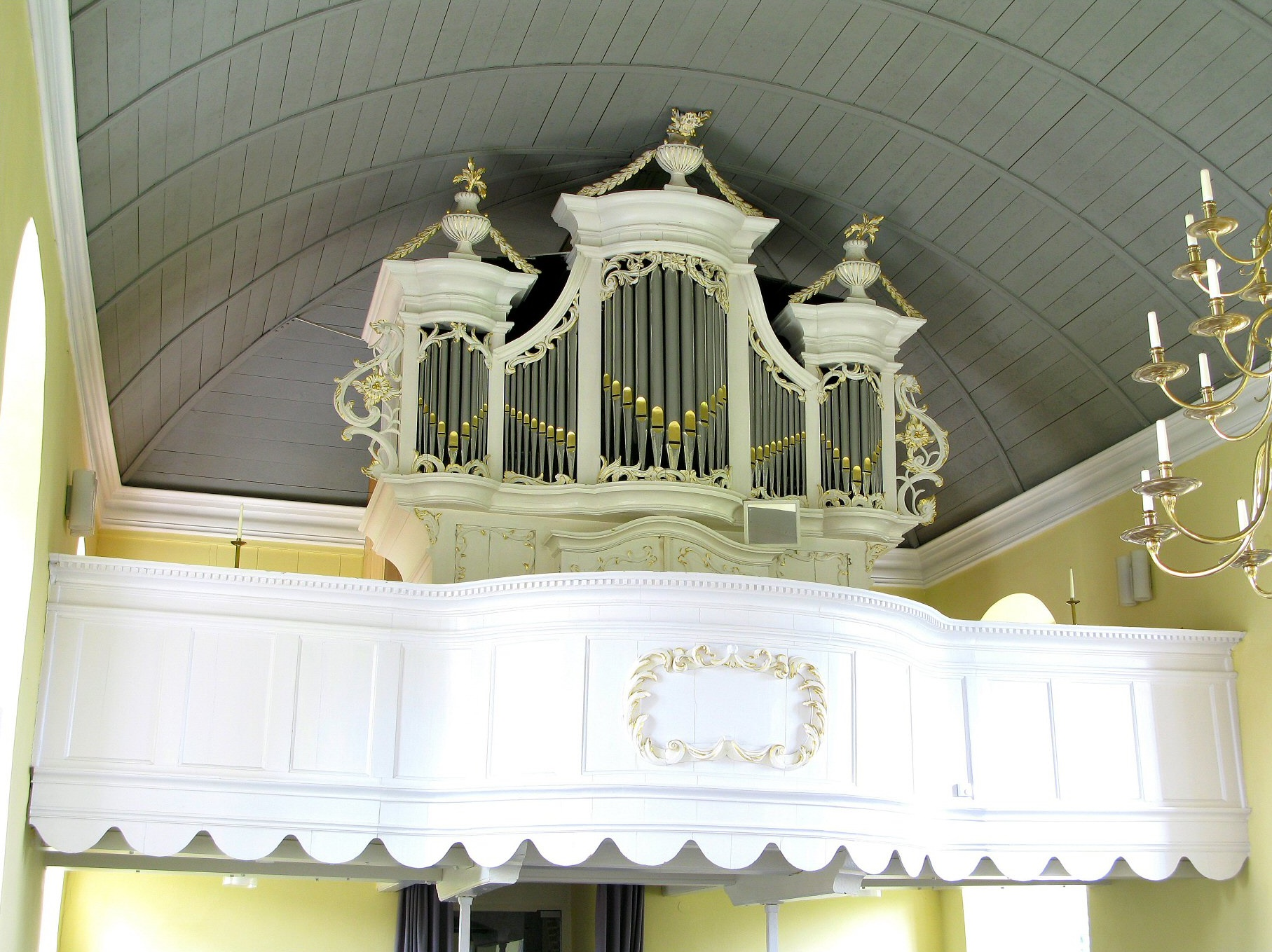 Orgel in Woquard, Landkreis Aurich